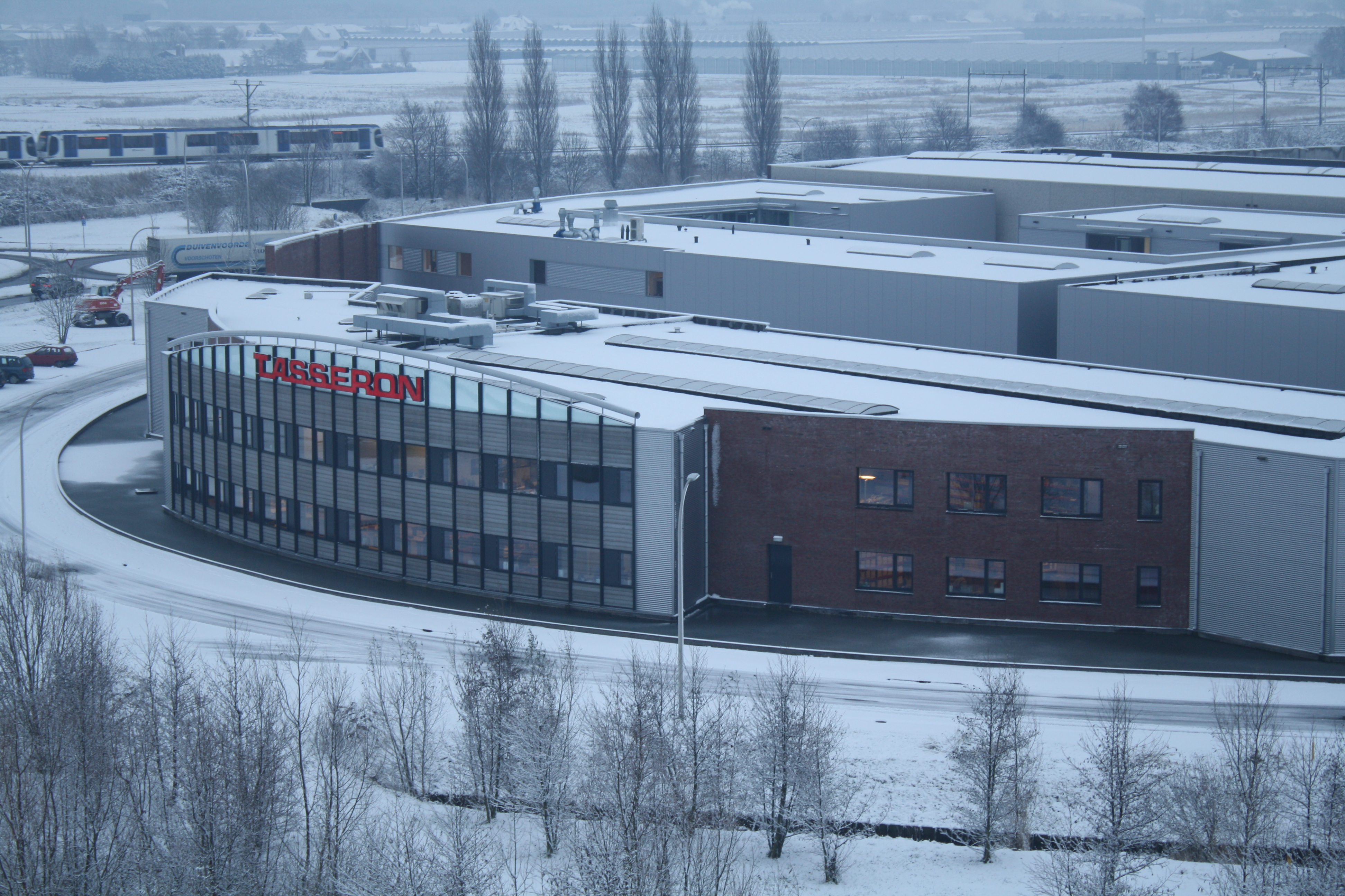 Hoofdvestiging Tasseron, NL 2017